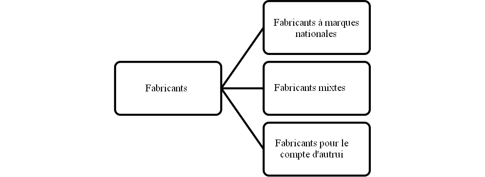 Les fabricants et les MDD